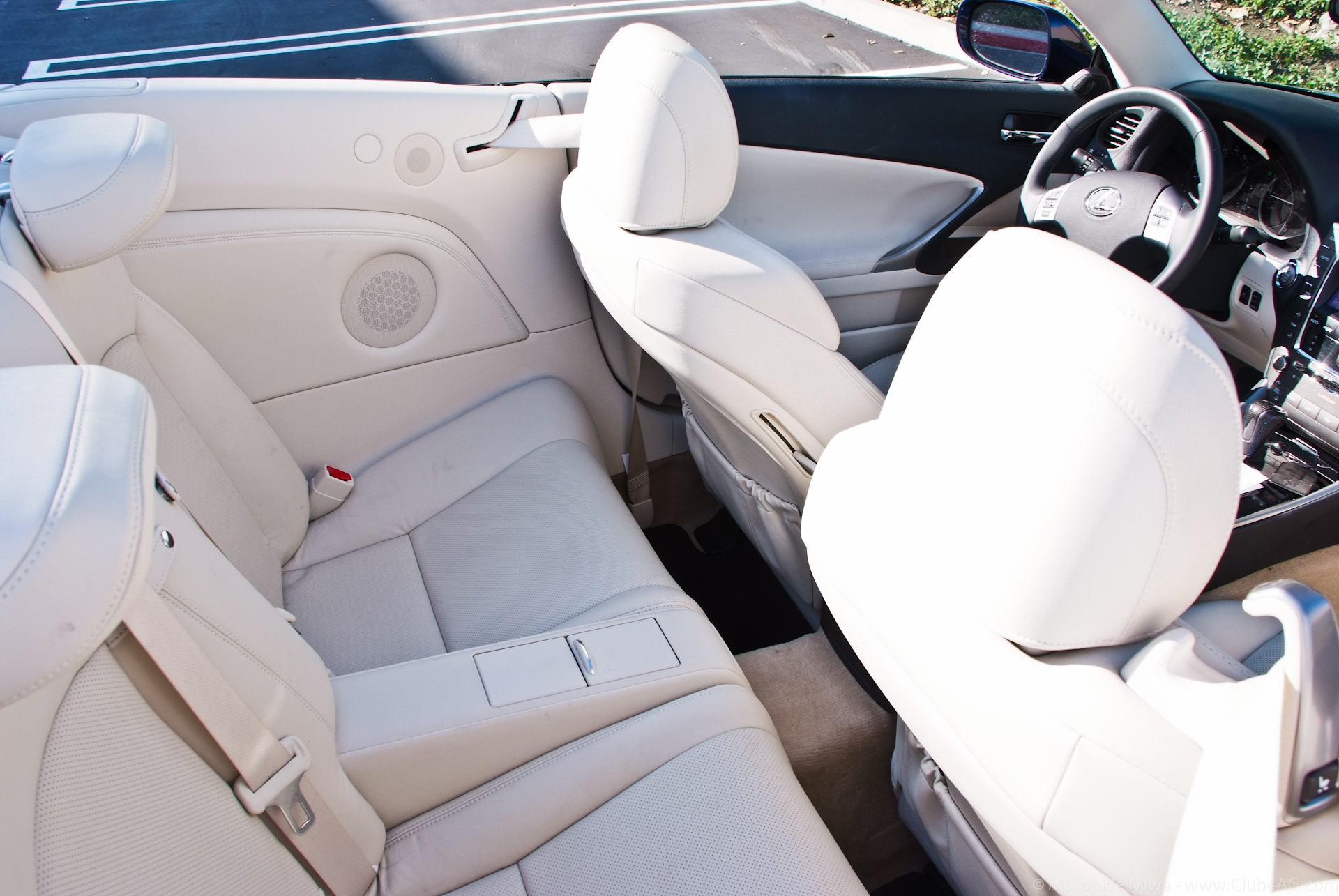 2011 Lexus IS-C F-Sport